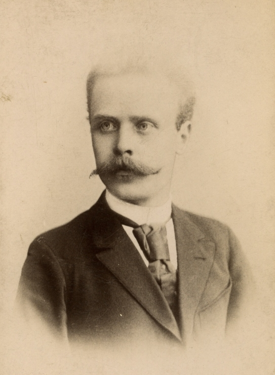 Konstantin Türnpu, eesti helilooja ja koorijuht